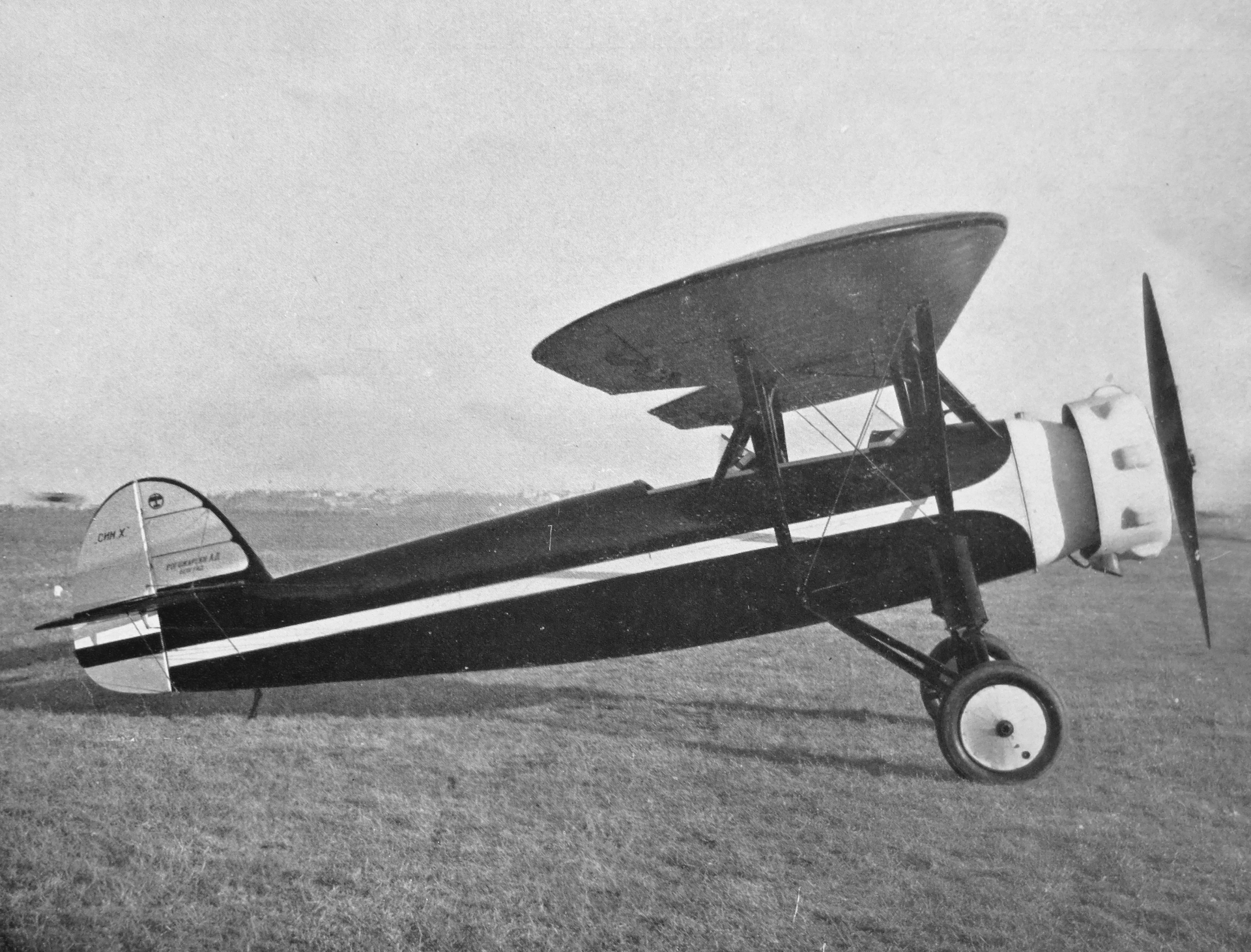 Rožagarski SIM-X a Walter NZR 120 (1937)